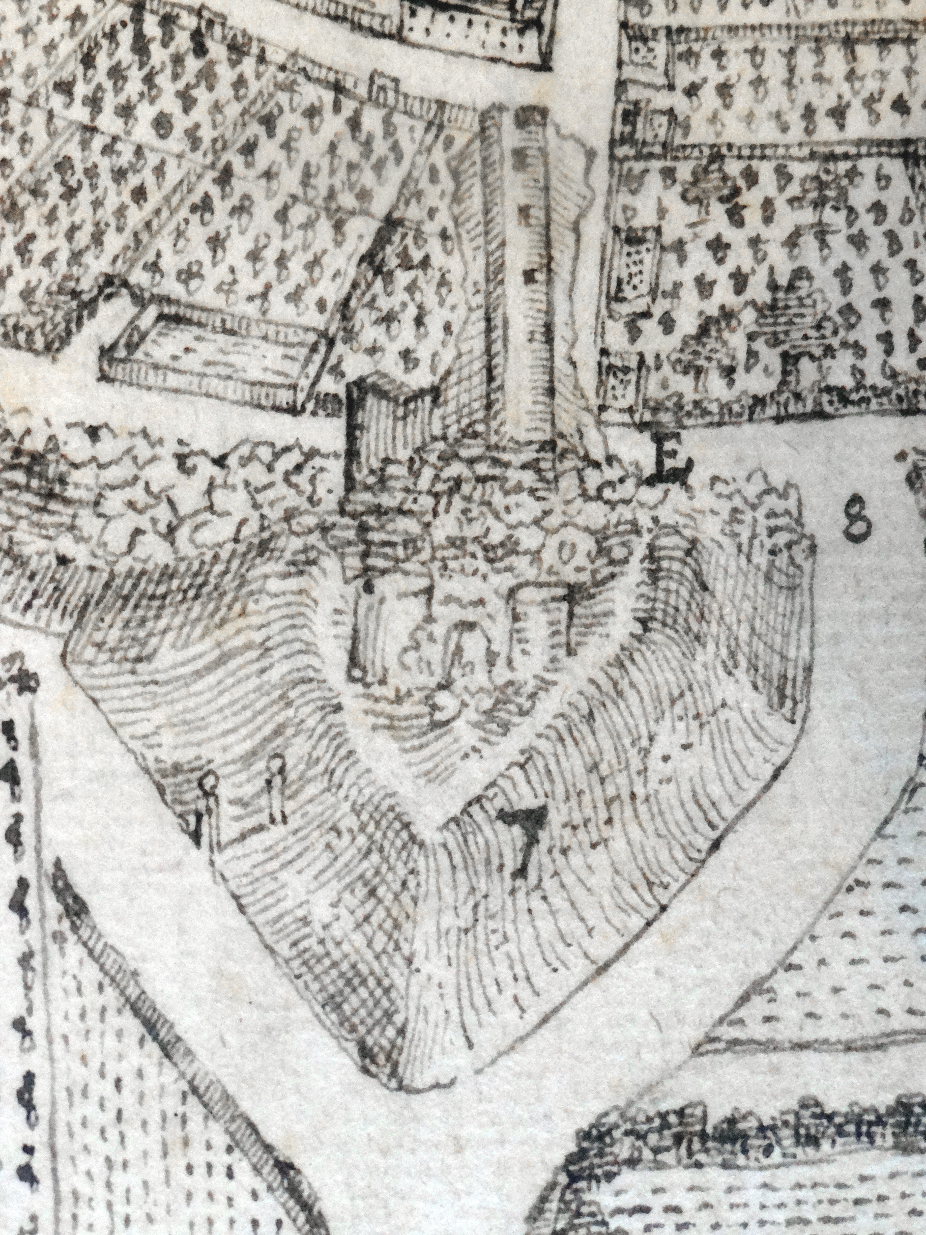 Mainzer Tor, Worms, nach der Zerstörung 1689. Detail aus: Peter Hamman: Ansicht der Stadt Worms nach der Zerstörung 1689 von Norden. Stadtarchiv Worms, Abt. 1B, Nr. 48.